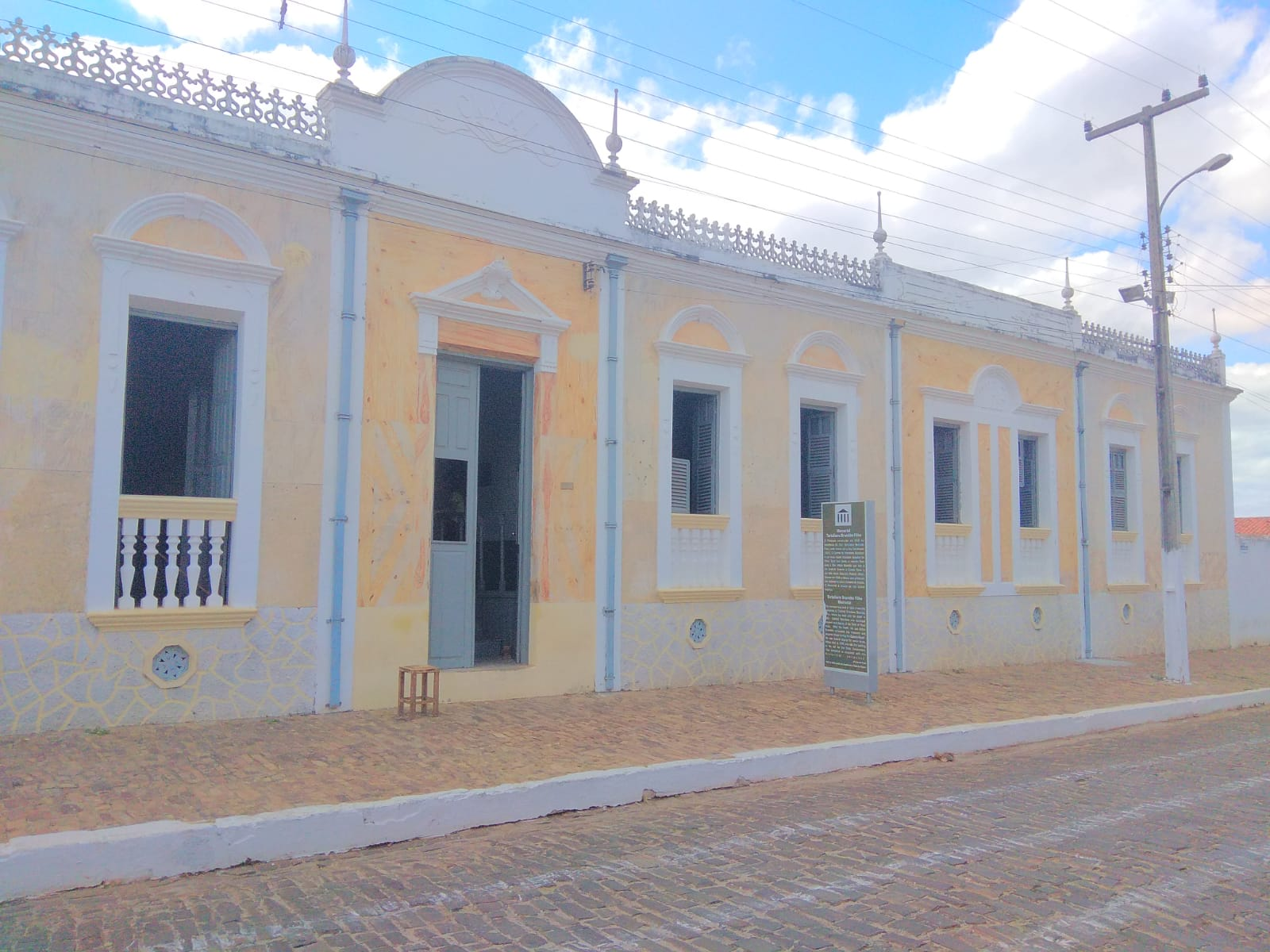 Vista externa do Memorial Tertuliano Milton Brandão, em Pedro II, no Piauí.